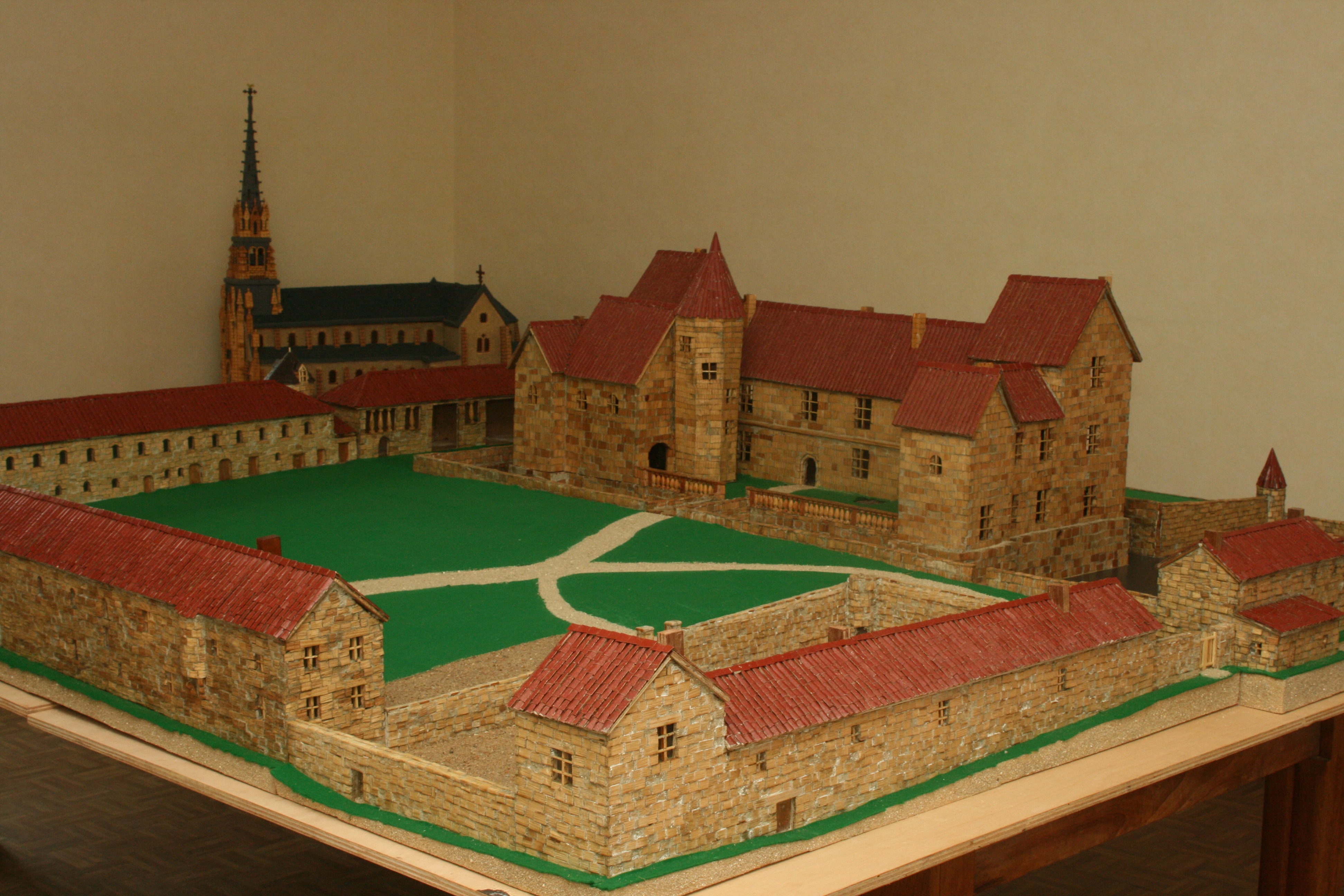 Maquette du château de la Durbelière à Saint-Aubin-de Baubigné